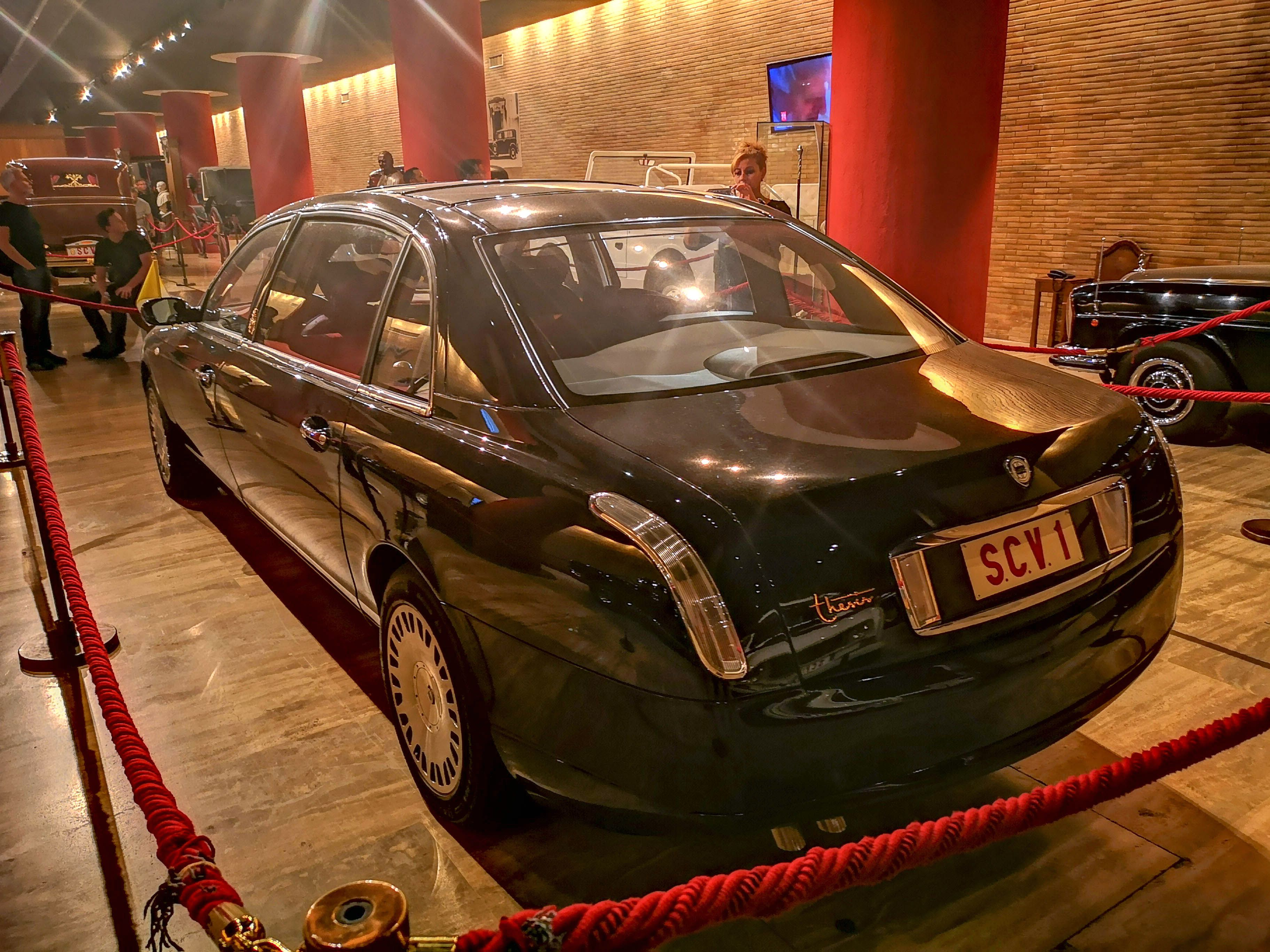 Ланчия Тезис - папамобил, снимка от Ватикански музей, Рим